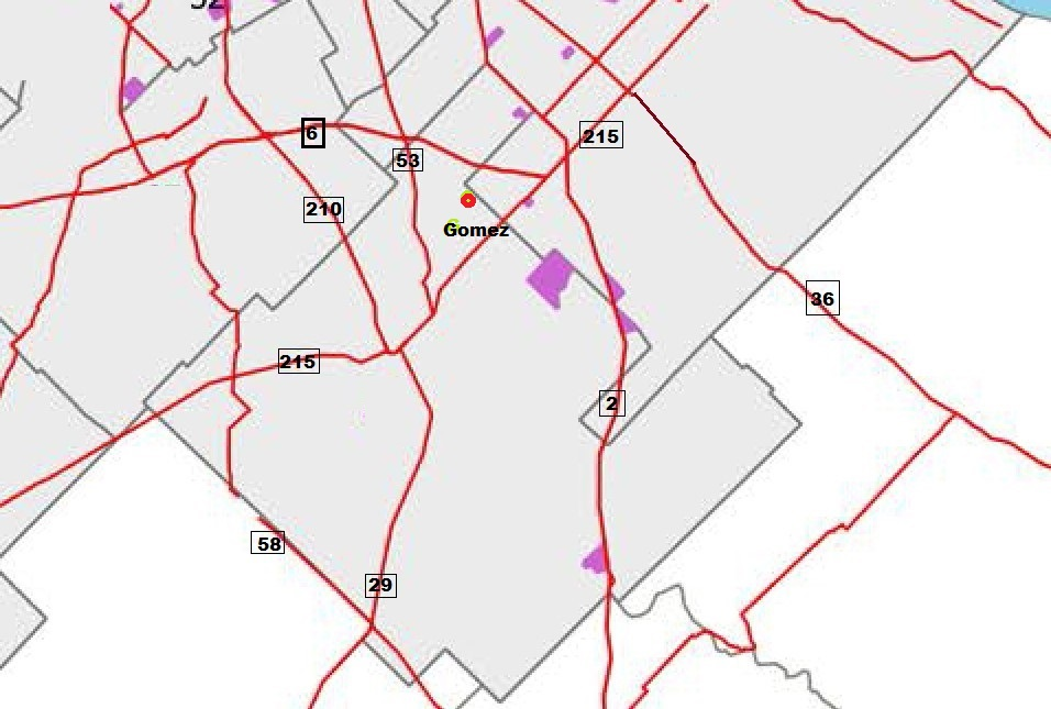 Ubicacion de Gomez(Brandsen)